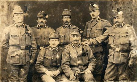 Ljubljanski 27. gorski strelski polk